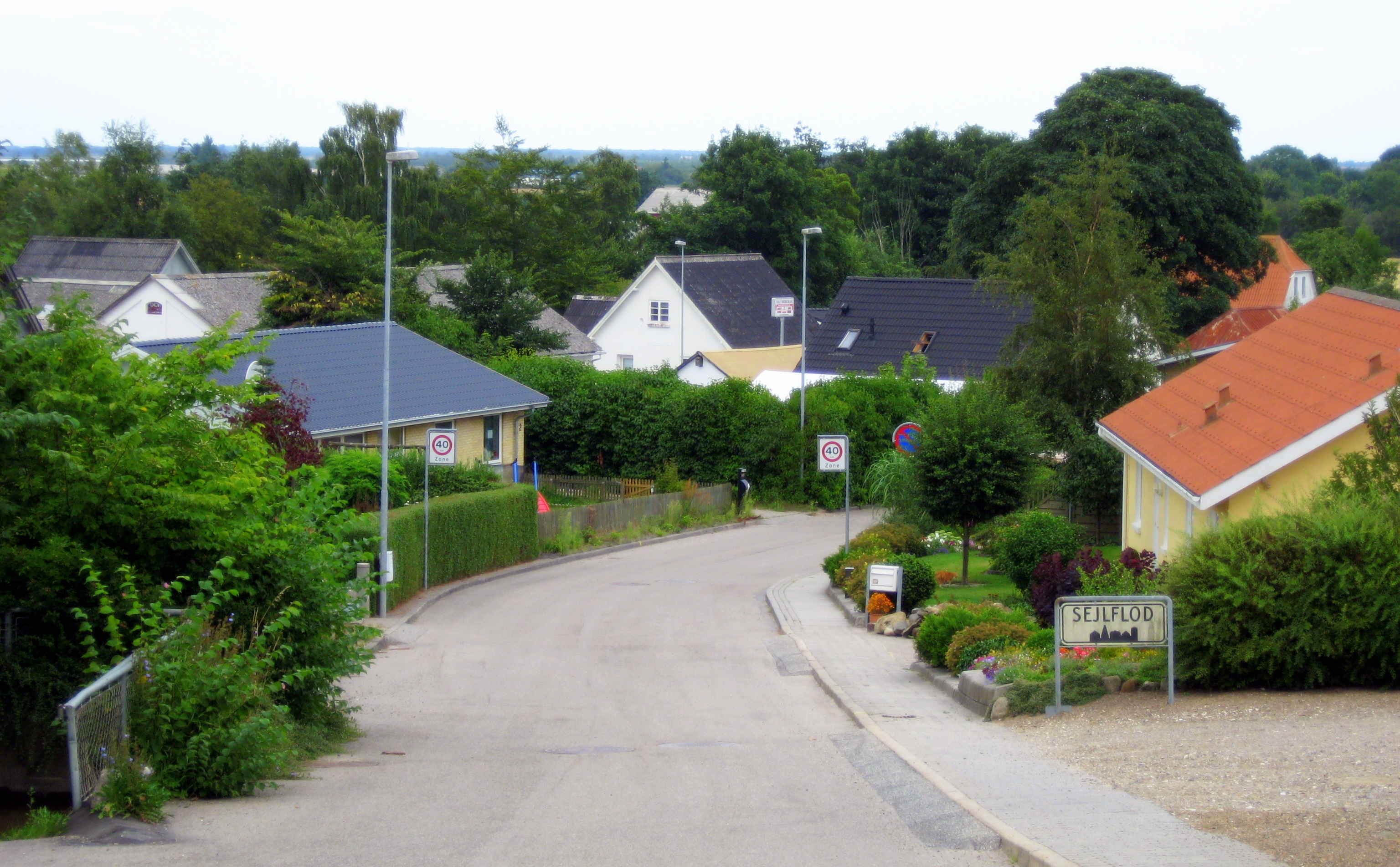 Sejlflod, Aalborg Kommune